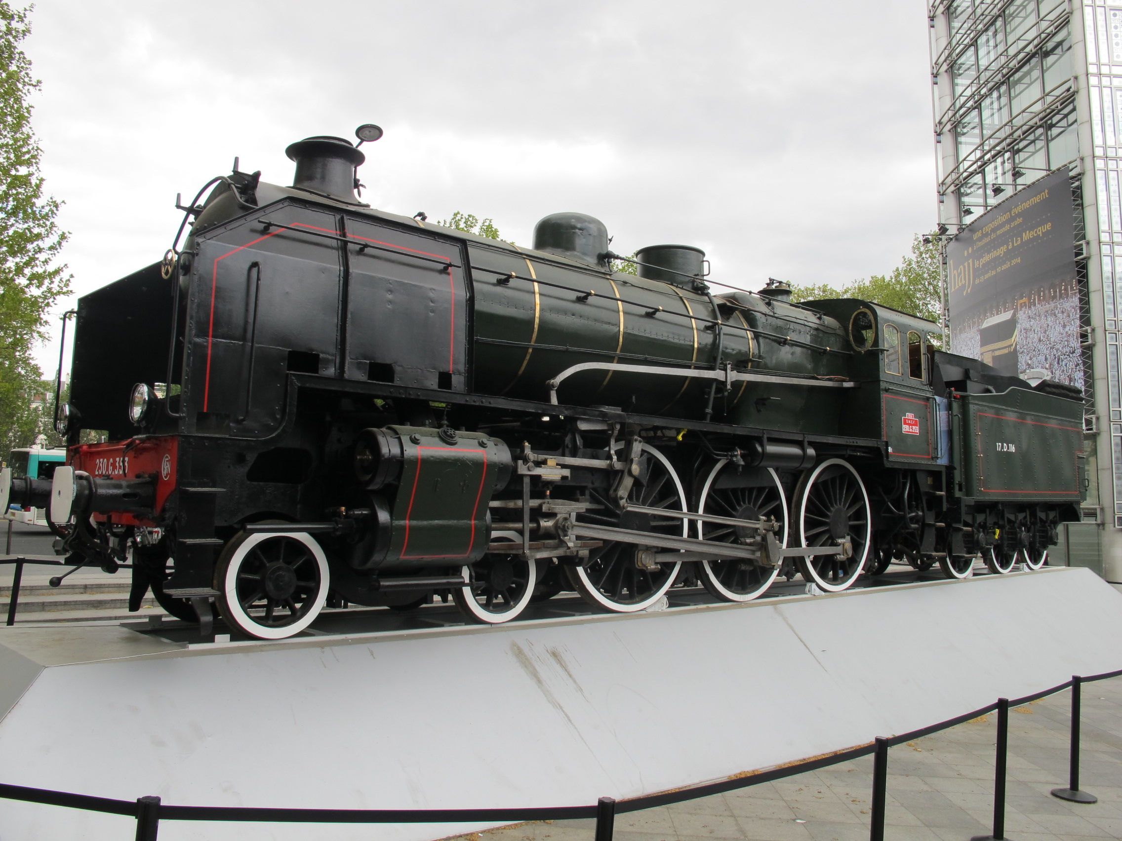 Une partie des voitures d'époque est parquée en 2014 le long de l'Institut du monde arabe, dans le cadre de l'exposition Il était une fois l'Orient-Express.